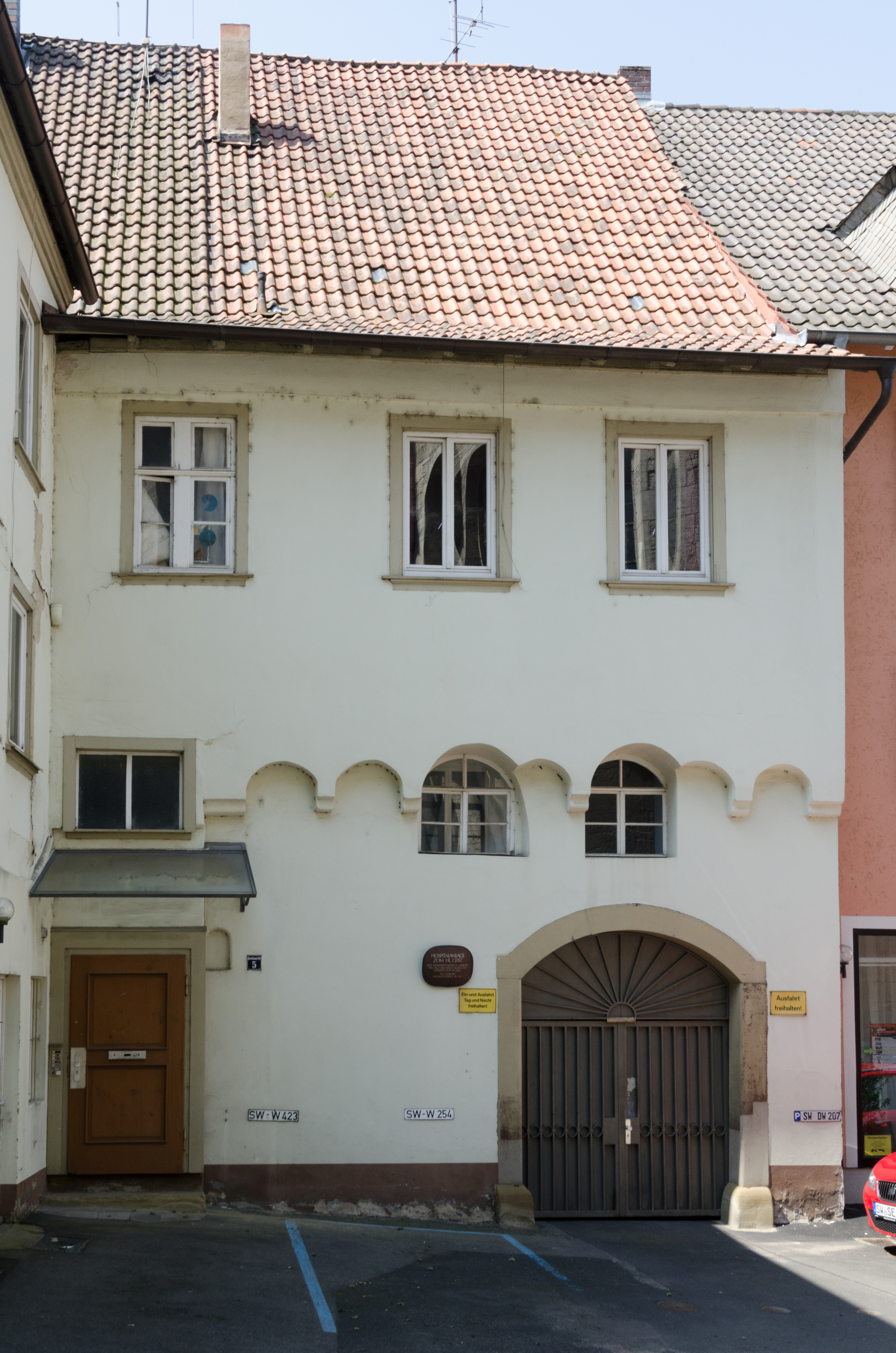 Schweinfurt, Anton-Niedermeier-Platz 5